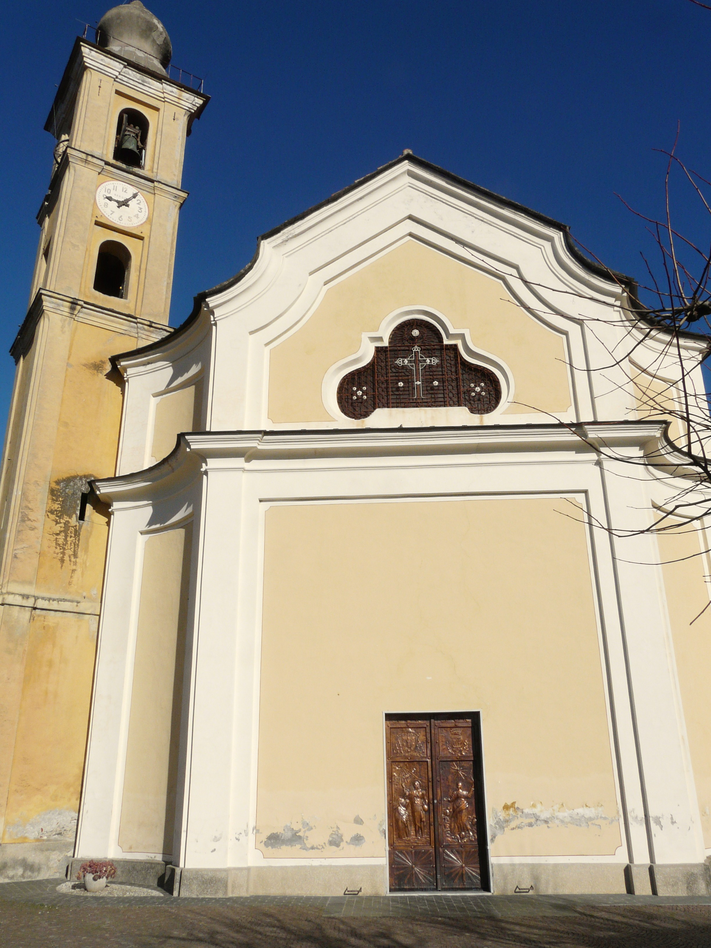 Chiesa di Santa Reparata, Aquila d'Arroscia, Liguria, Italia